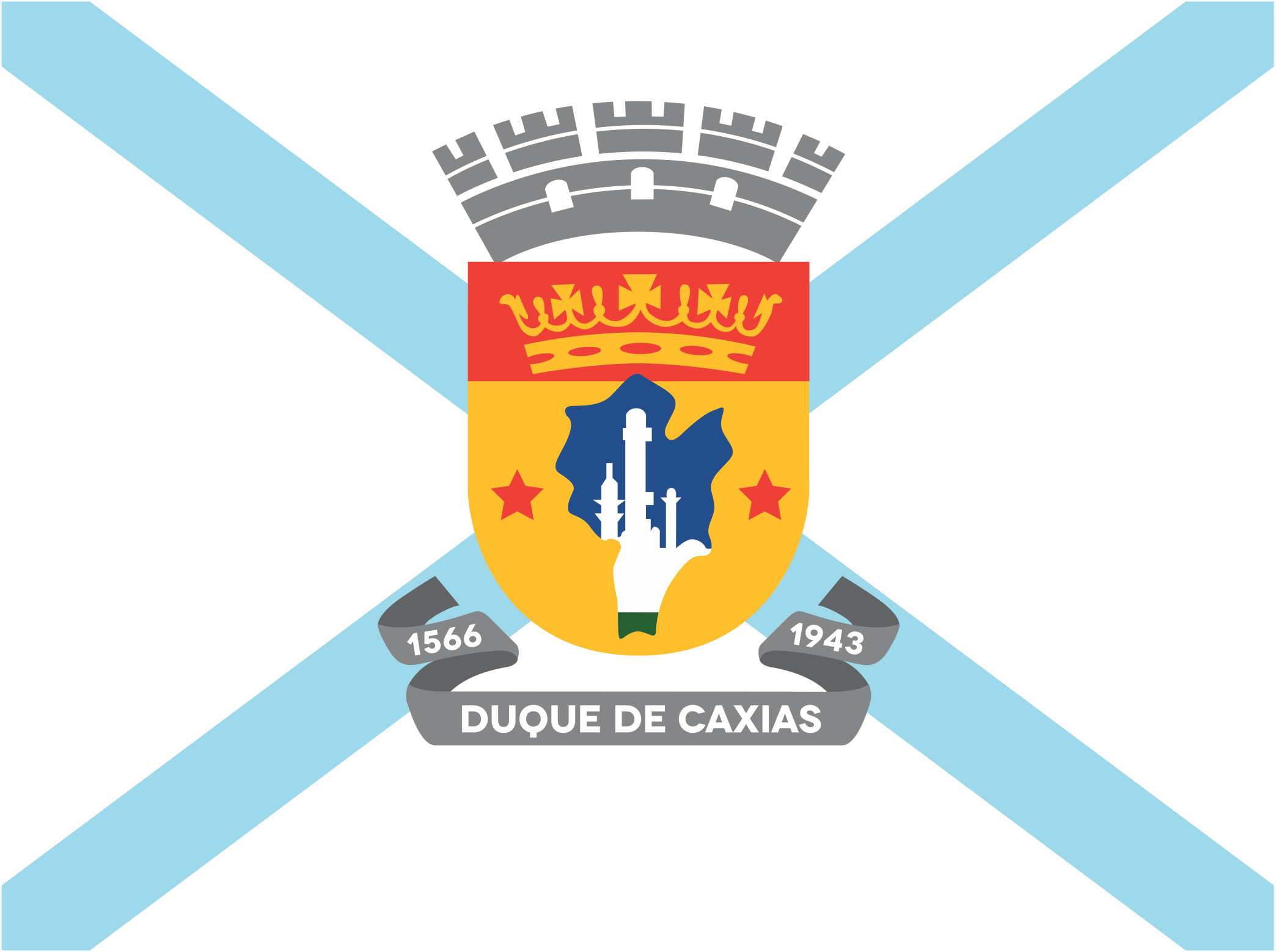 Bandeira utilizada pela prefeitura de Duque de Caxias